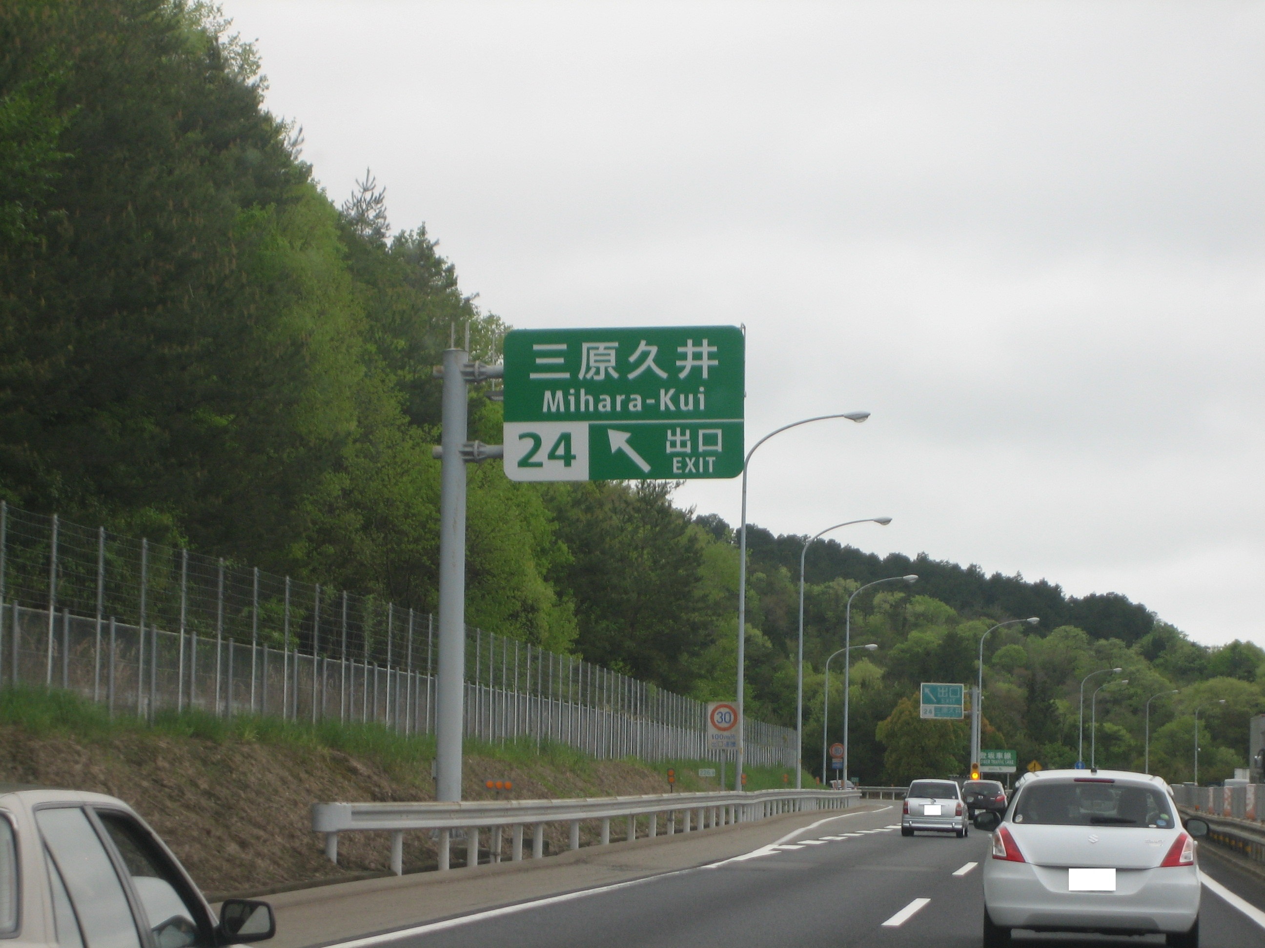 三原久井IC